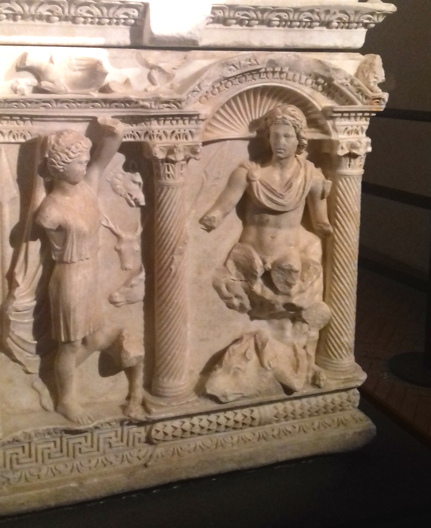 Sarcofago di Melfi - Atalanta e Meleagro